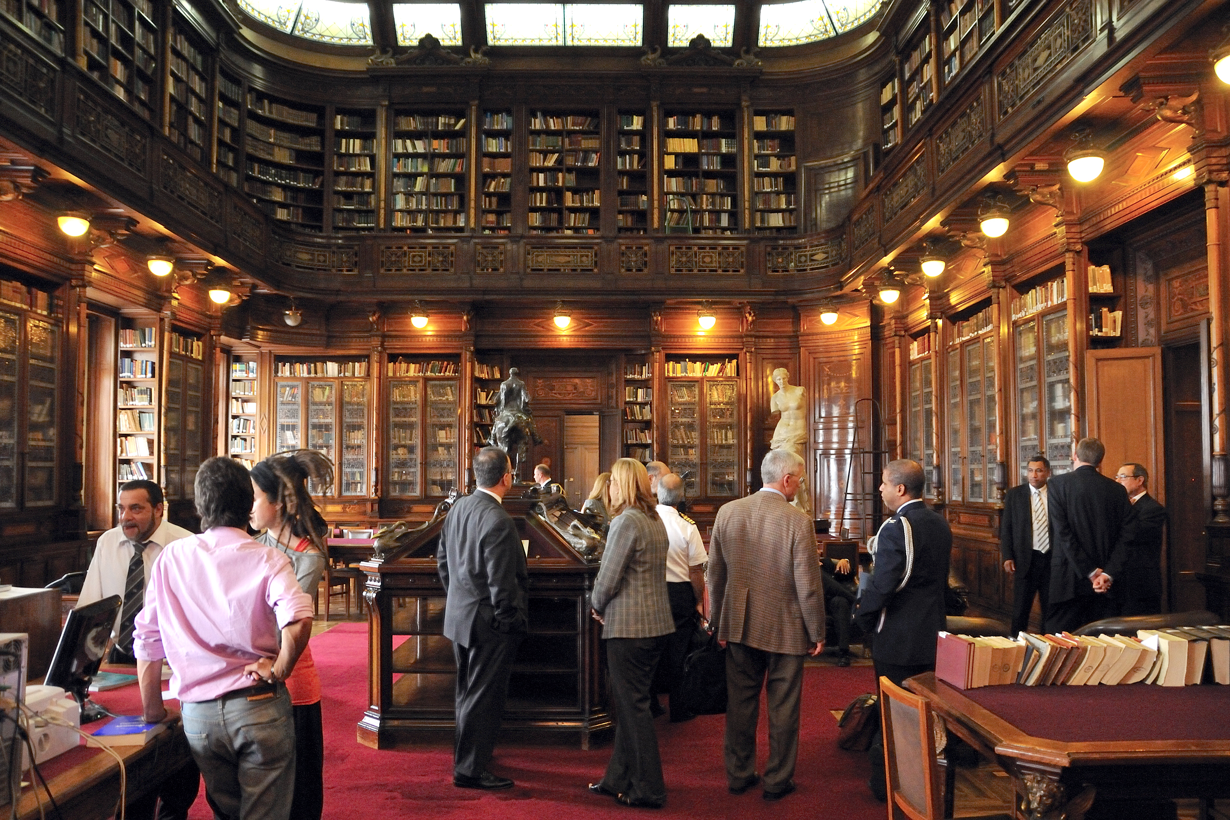 Biblioteca del Poder Legislativo de Uruguay. El jueves 17 de marzo de 2011, el Subsecretario Adjunto de Defensa estadounidense para el Hemisferio Occidental, Frank Mora, fue recibido en el Parlamento por el Vicepresidente de la República, Danilo Astori y legisladores uruguayos vinculados a asuntos de defensa nacional. Posteriormente Mora fue invitado a realizar un tour por el Palacio Legislativo, sede del Poder Legislativo del Uruguay. La fotografía fue tomada en la Biblioteca del Poder Legislativo de Uruguay, que se encuentra en el edificio del Poder Legislativo.